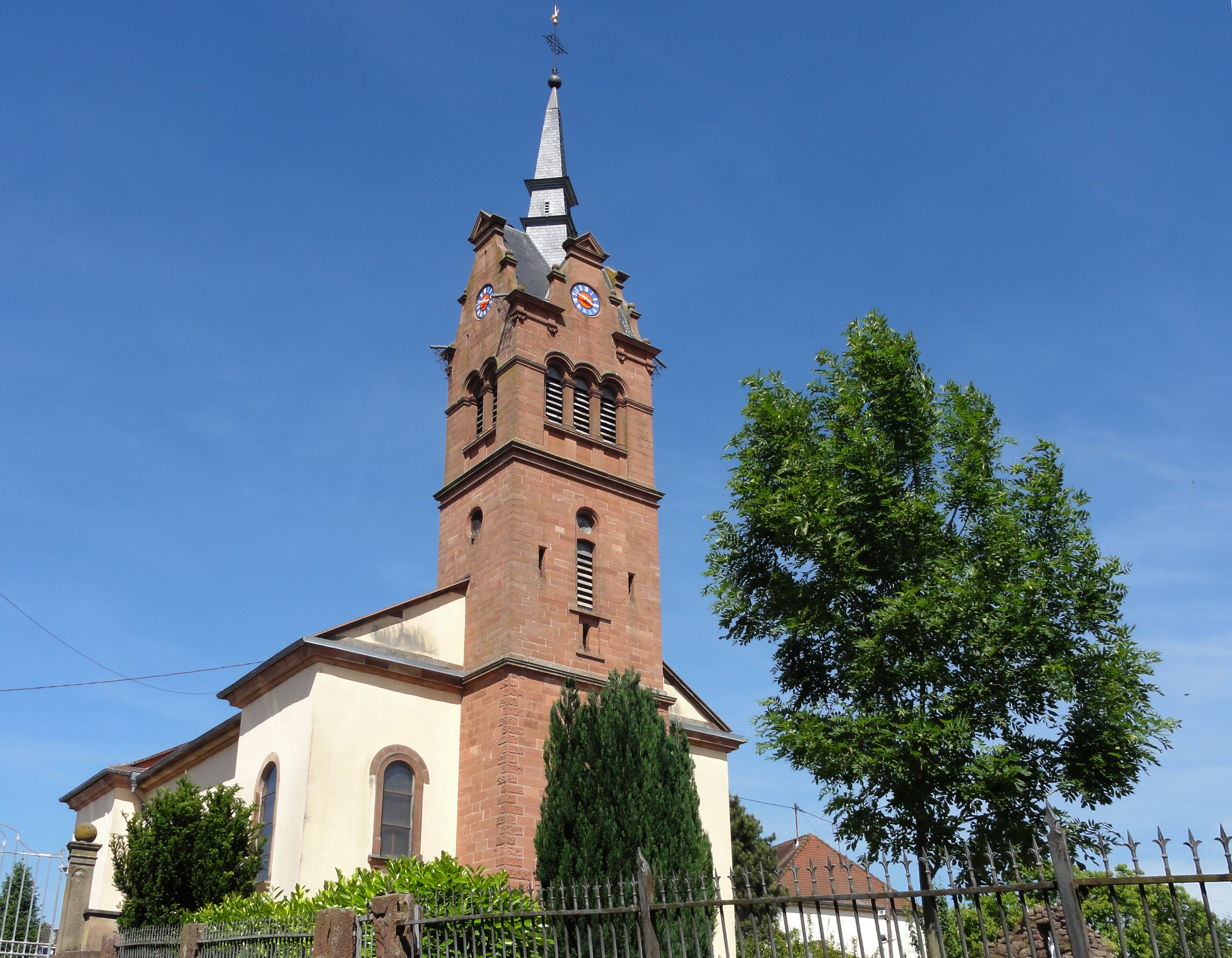 Alsace, Bas-Rhin, Église Saint-Étienne de Bilwisheim (IA00119125).